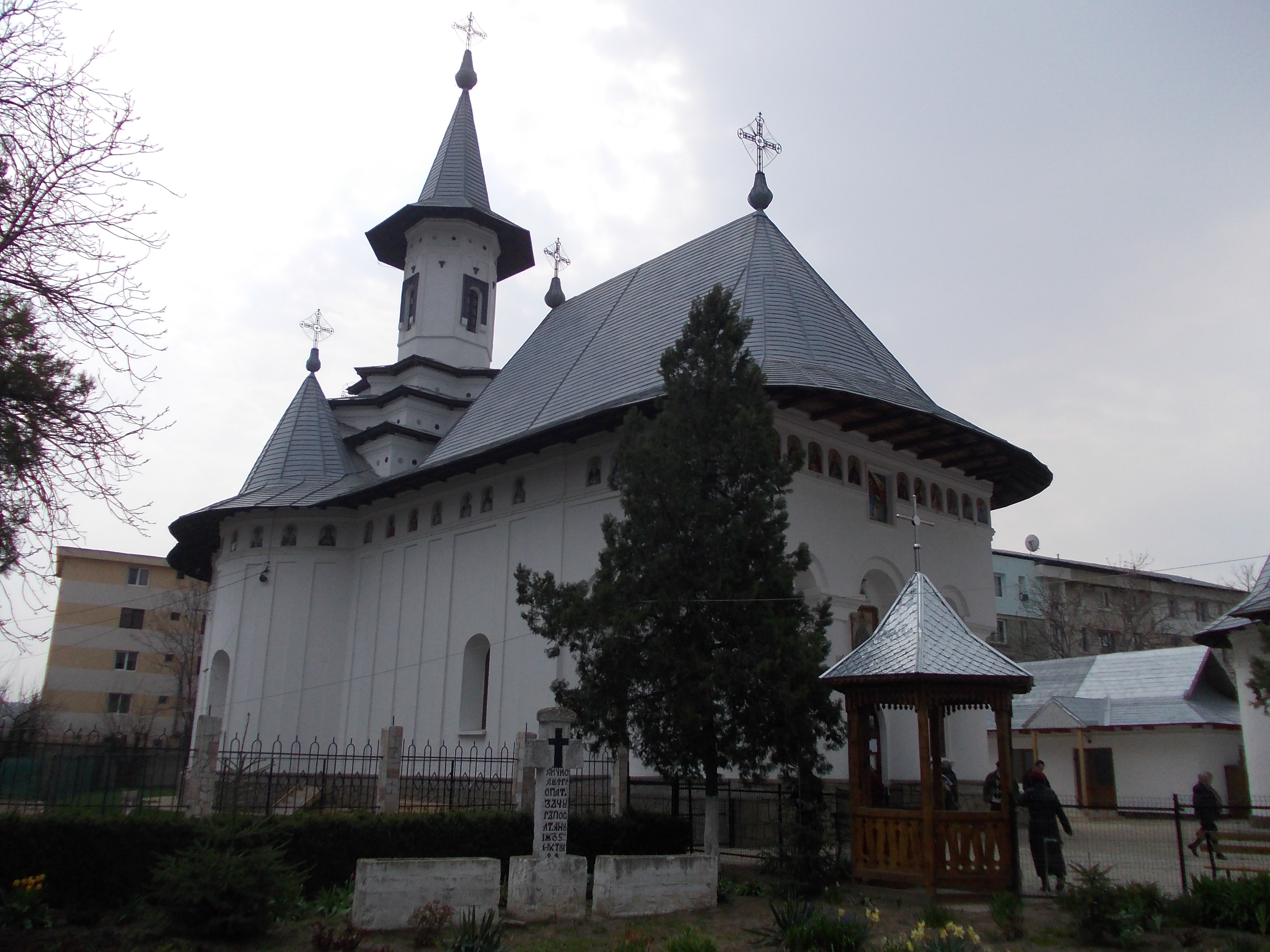 biserica Sf Spiridon din Bârlad